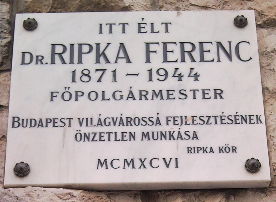 Ripka Ferenc főpolgármester emléktáblája